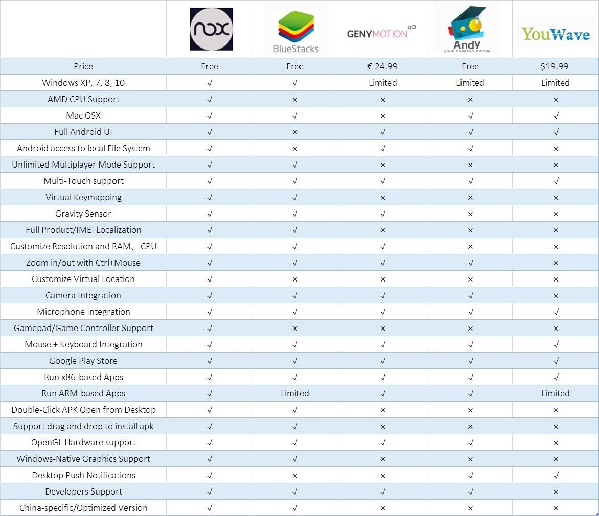 Android emulators stats